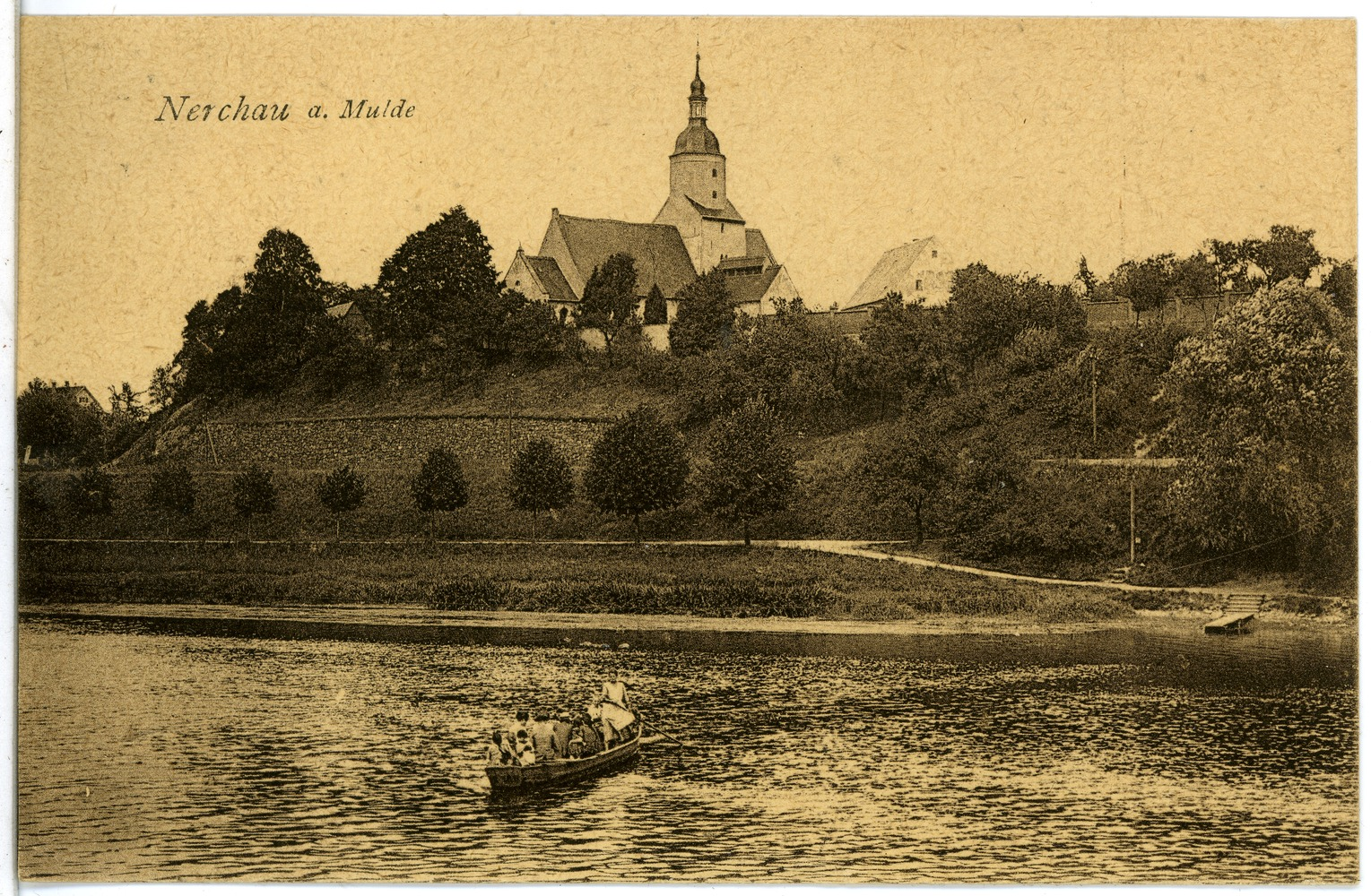 Nerchau; Fähre This postcard is from publisher Brück & Sohn in Meißen ( postcard has a unique number 21701 and is available in a higher resolution at the publisher. This images was uploaded in a cooperation project between Wikipedians and the publisher.